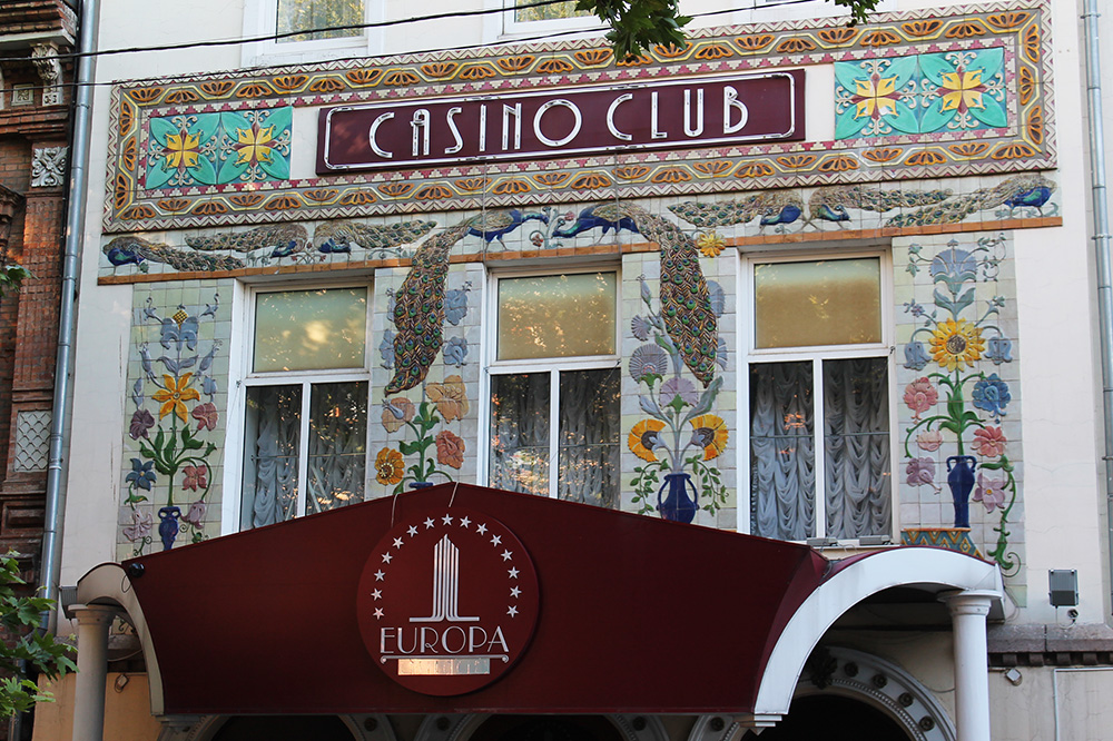 Будинок Хреннікова, Дніпро.